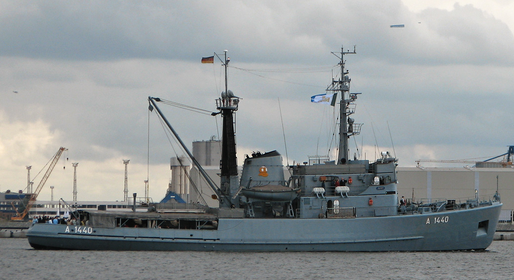 A1440 Juist (ehemals A1456) Taucherschulboot (Typ 754), ehemals Seeschlepper Wangerooge-Klasse (Typ 722) Verdrängung: 1039 t Länge / Breite / Tiefgang: 51,78 m / Breite 12,11 m / Tiefgang 4,20 m Besatzung: 24